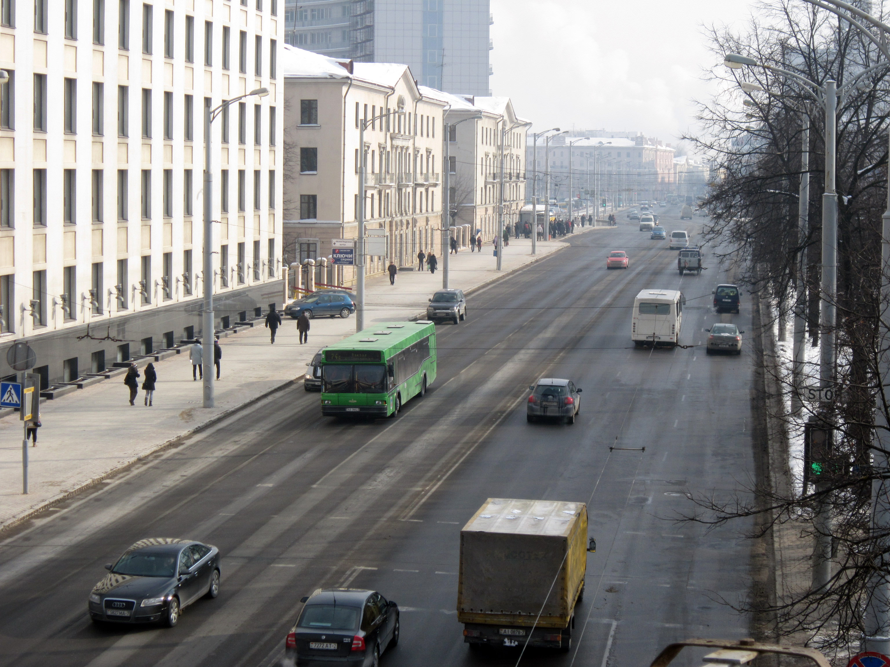 Минск. Улица Бобруйская